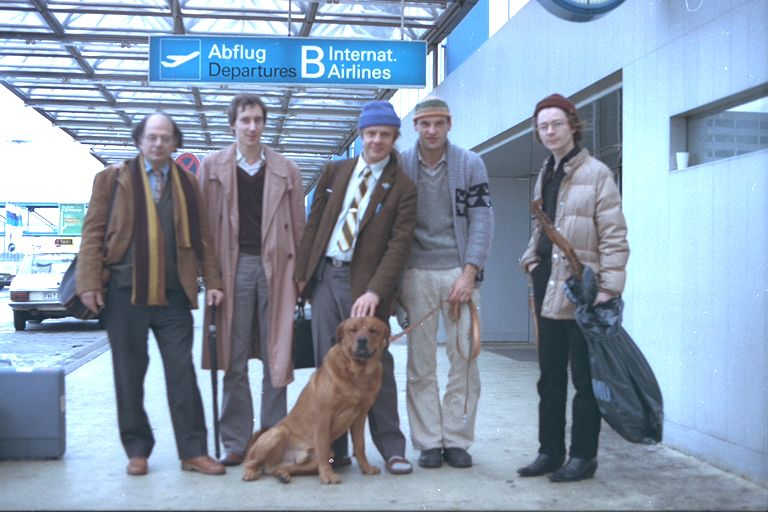 Beschreibung: Allen Ginsberg (links) mit Peter Orlovski (mitte) und Steven Taylor (rechts) am Frankfurter Flughafen 1978 Quelle: by Herbert Rusche